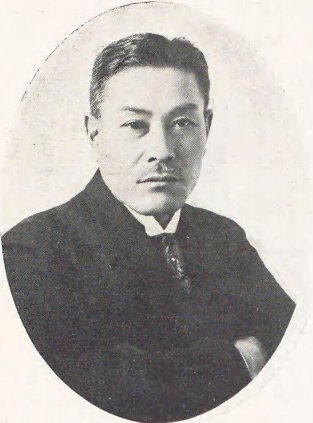 岡本英太郎